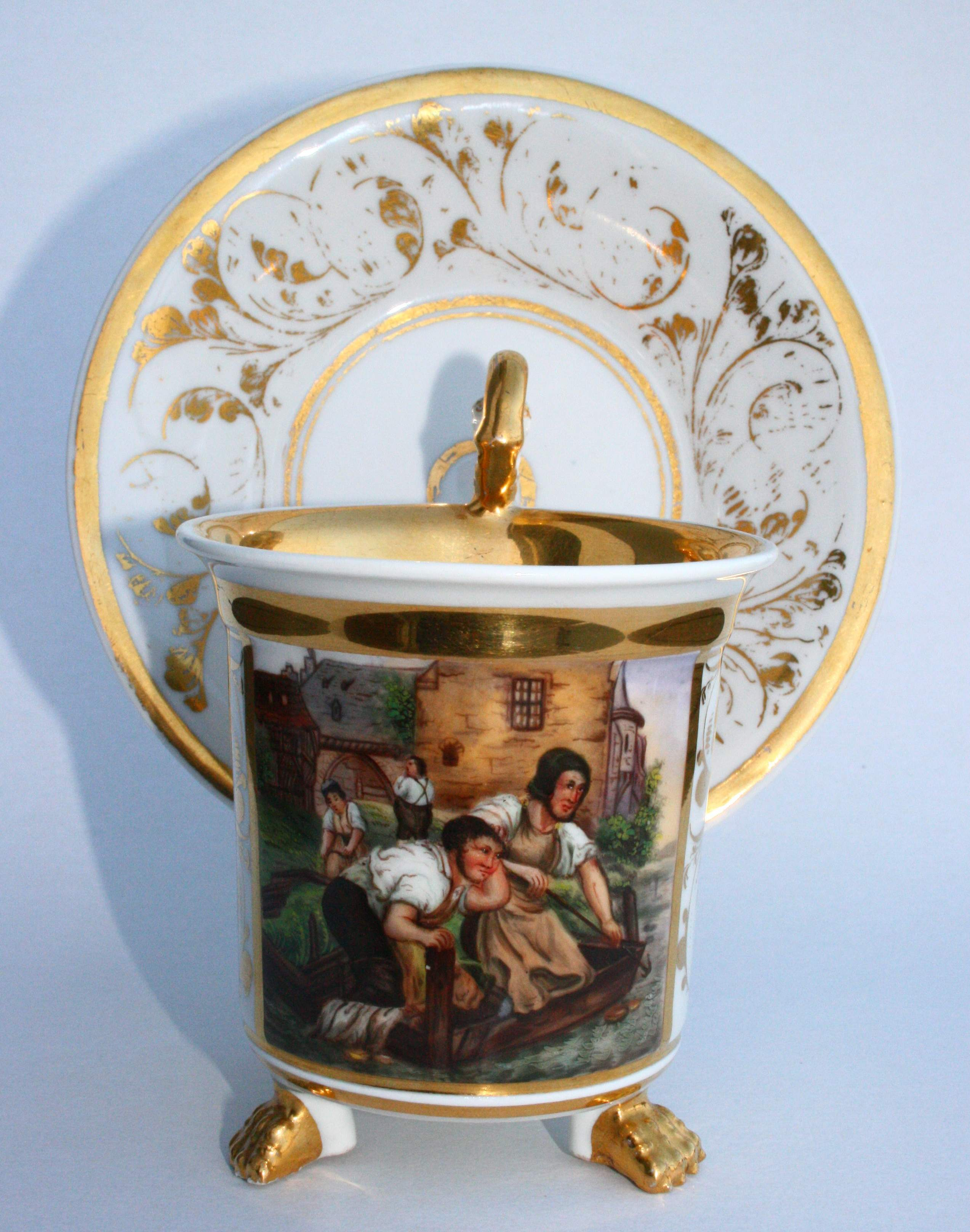 Bouillon-Tasse um 1832, auf Vorderseite goldgerahmte Szene „Die trauernden Lohgerber“ nach einem Gemälde von Adolf Schroedter